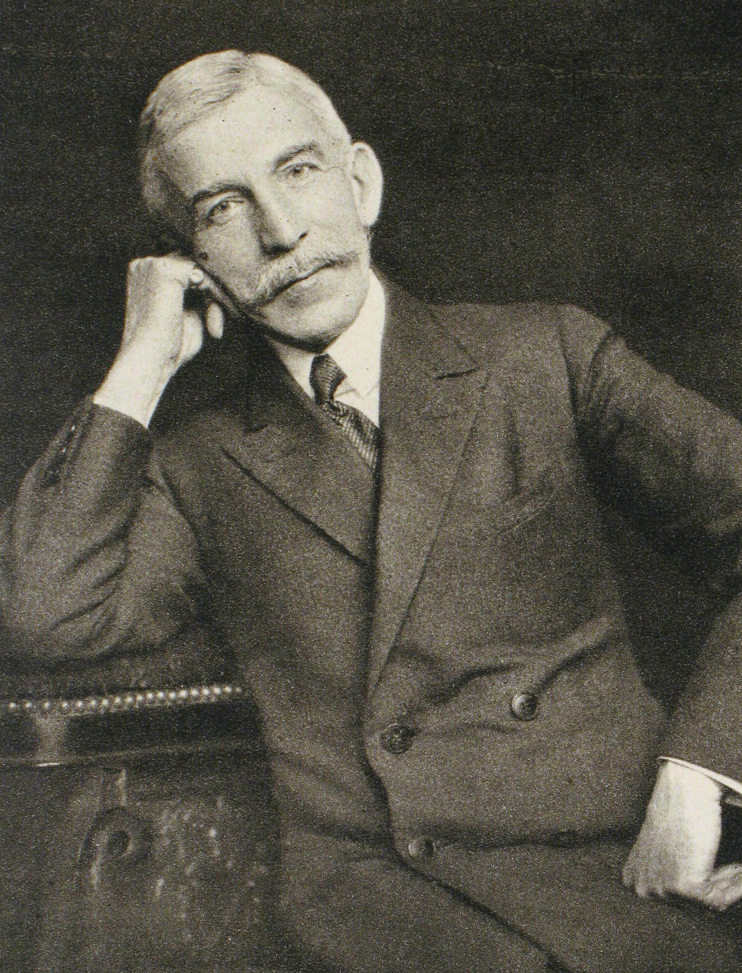 Maurice de Coppet 1920-luvun lopulla.